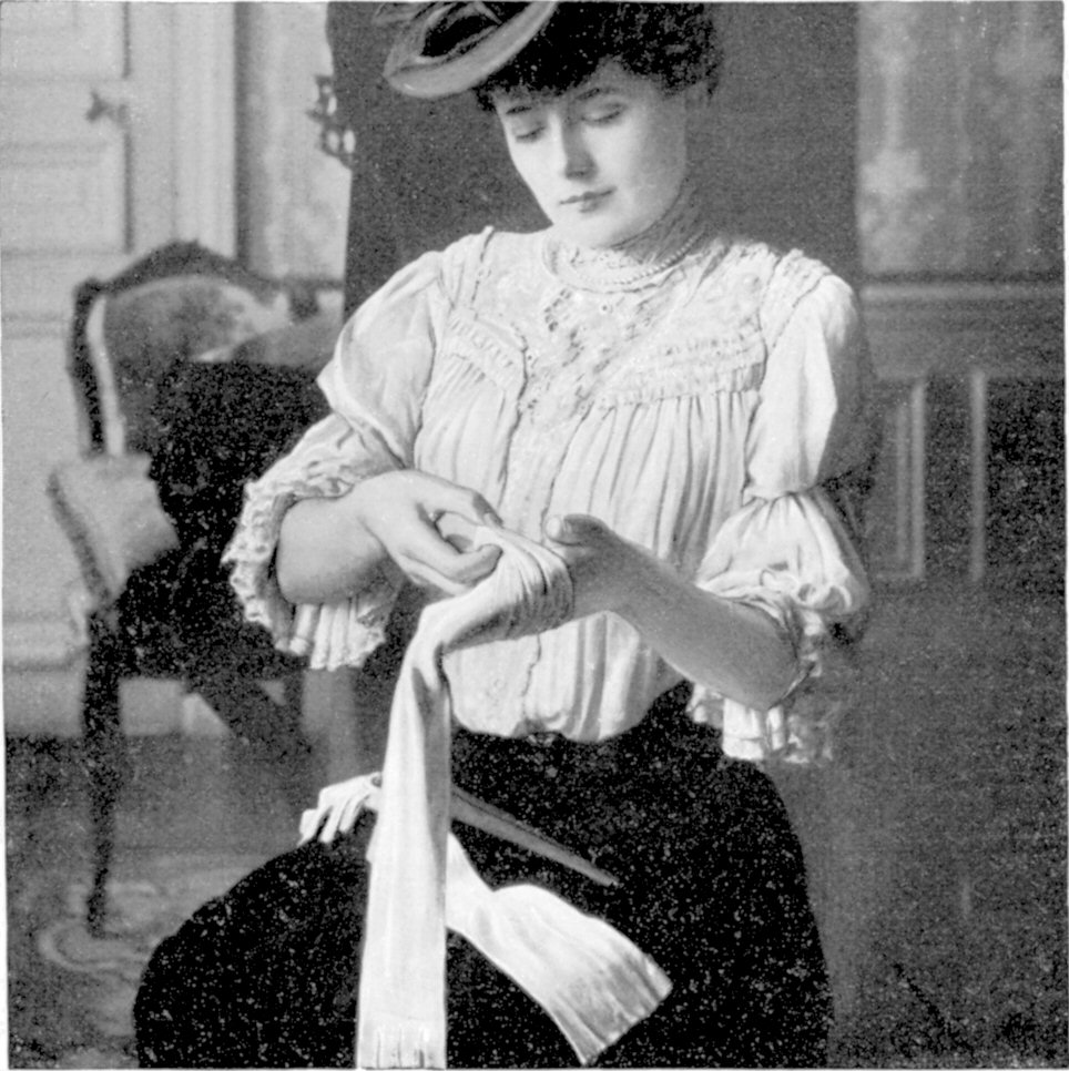 LE COMMENCEMENT. Opération qui doit être menée avec prudence, un geste nerveux et la peau du gant se déchire